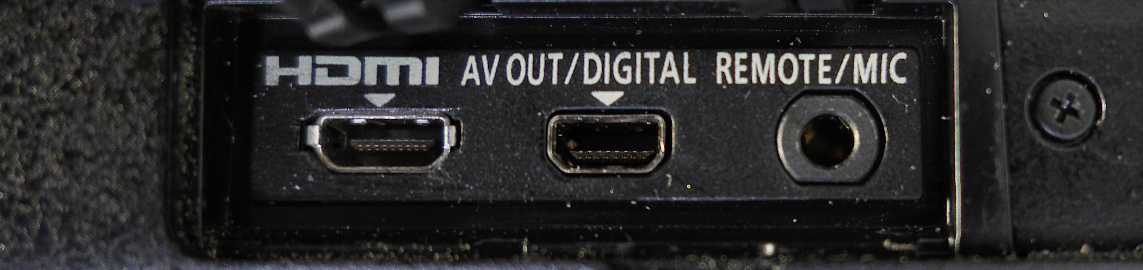 Drei Buchsen an einer digitalen Systemkamera für verschiedene elektrische Schnittstellen: für HDMI, für analoge ("AV OUT" = Composite Video) und digitale Bildübertragung ("DIGITAL" = USB mit Kabeladapter) für Bildschirme oder Drucker und Klinkenbuchse für Kabelfernbedienung ("REMOTE") oder externes Mikrofon ("MIC").